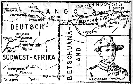 Kurzbericht über eine deutsche Militärexpedidition zum Caprivi-Zipfel und Hauptmann Streitwolf am 6. Dez. 1908.